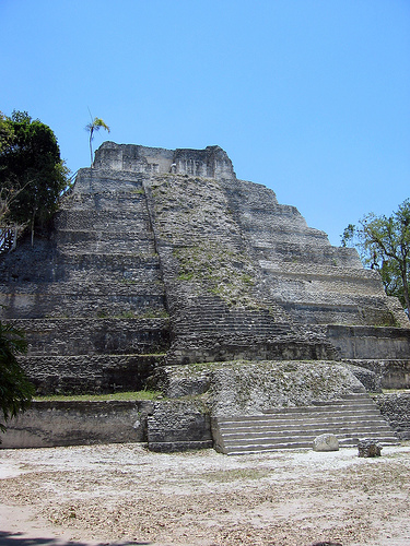 Yaxhá Templo 216, Octubre del 2006